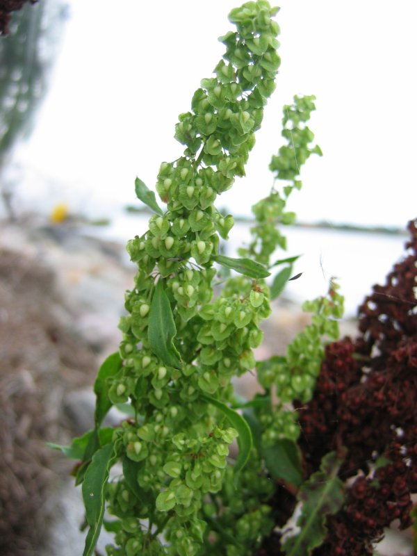 Krauser Ampfer Rumex crispus, Wismarbucht